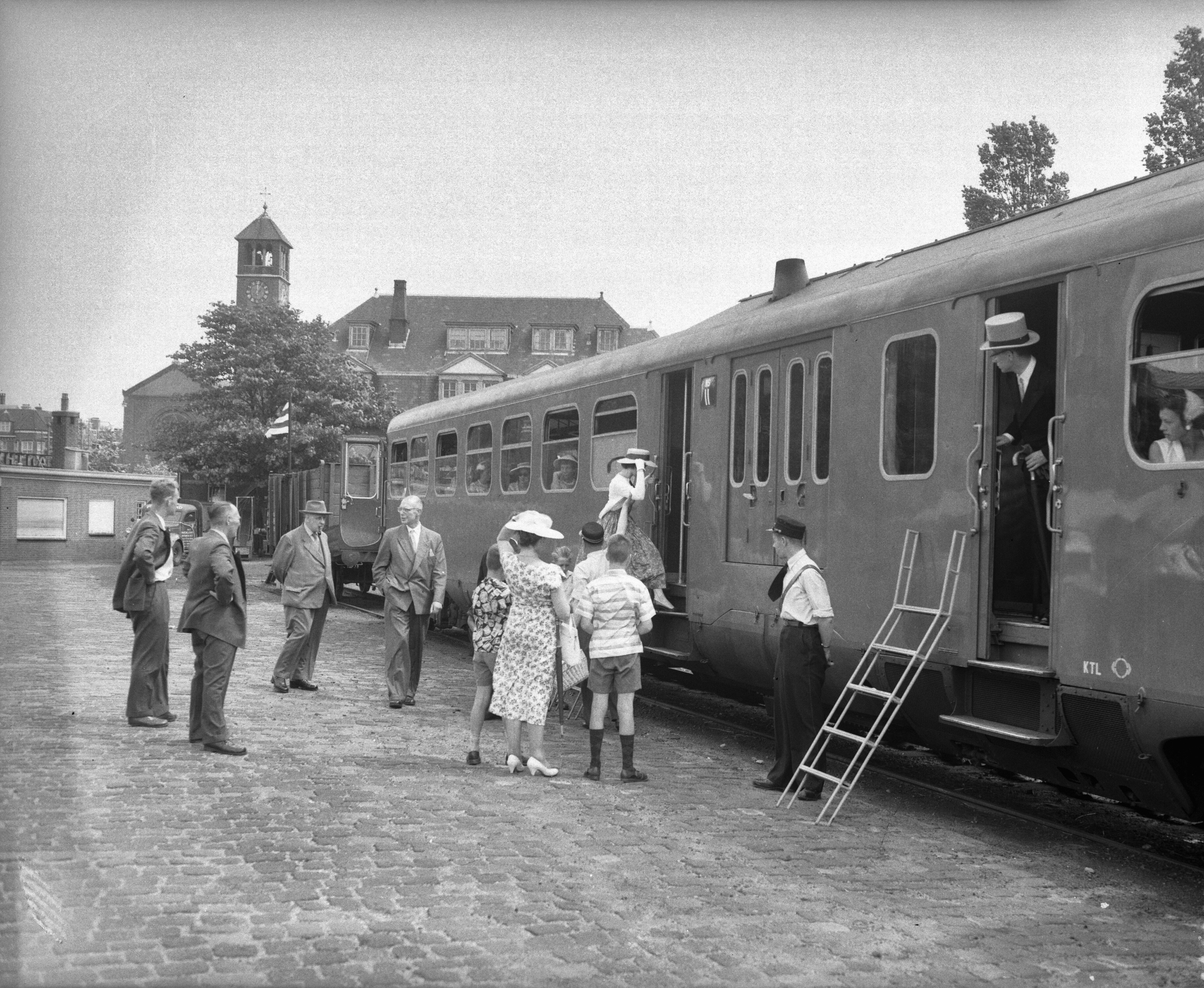 Collectie / Archief : Fotocollectie Anefo Reportage / Serie : [ onbekend ] Beschrijving : Haarlemmermeerstation een dag in gebruik voor studenten Datum : 6 juli 1957 Trefwoorden : STUDENTEN Fotograaf : Rossem, Wim van / Anefo Auteursrechthebbende : Nationaal Archief Materiaalsoort : Negatief (zwart/wit) Nummer archiefinventaris : bekijk toegang 2.24.01.04 Bestanddeelnummer : 908-7512 Reacties Geplaatst door Geschiedenis - UVA op 22 maart 2017 - 15:05. 65-e lustrum van de Universiteit van Amsterdam Gedeelte oude spoorlijn tussen Haarlemmermeerstation Amsterdam en de Kalfjeslaan te Amstelveen.